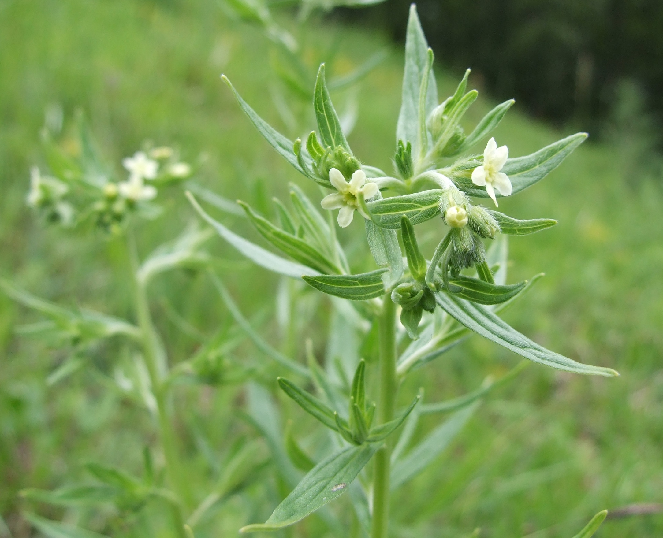 Lithospermum officinale auf beweidetem Halbtrockenrasen auf Keuper. Luxemburg.